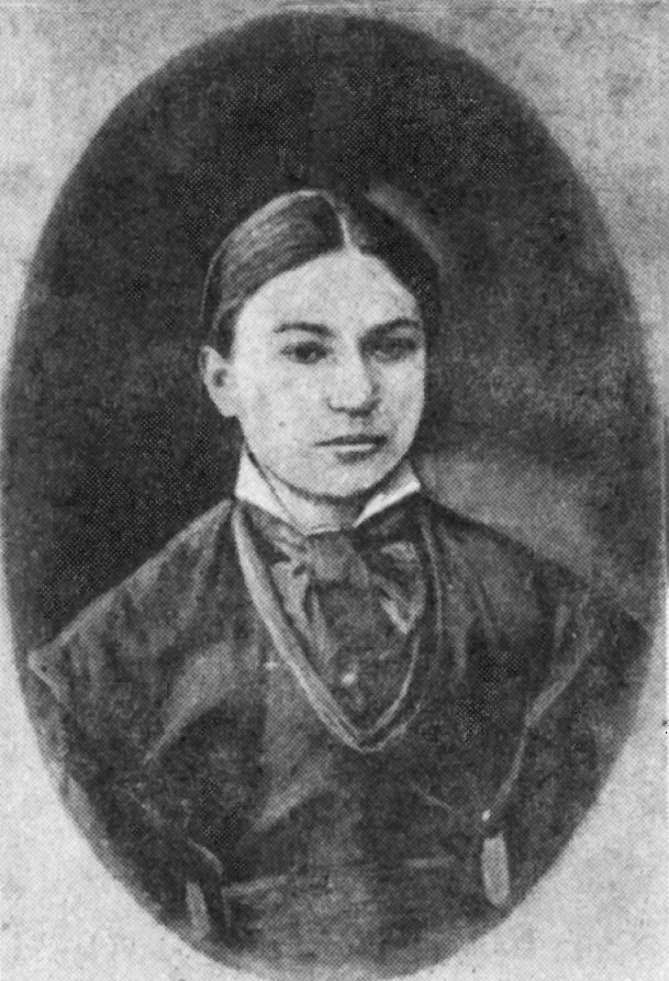 Наталья Михайлівна Линтварьова